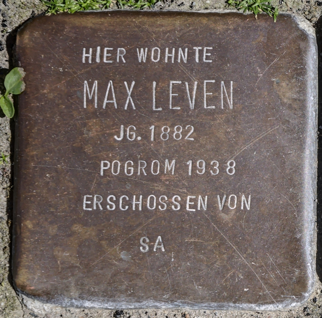 Stolperstein Solingen, Max-Leven-Gasse 5 Max Leven